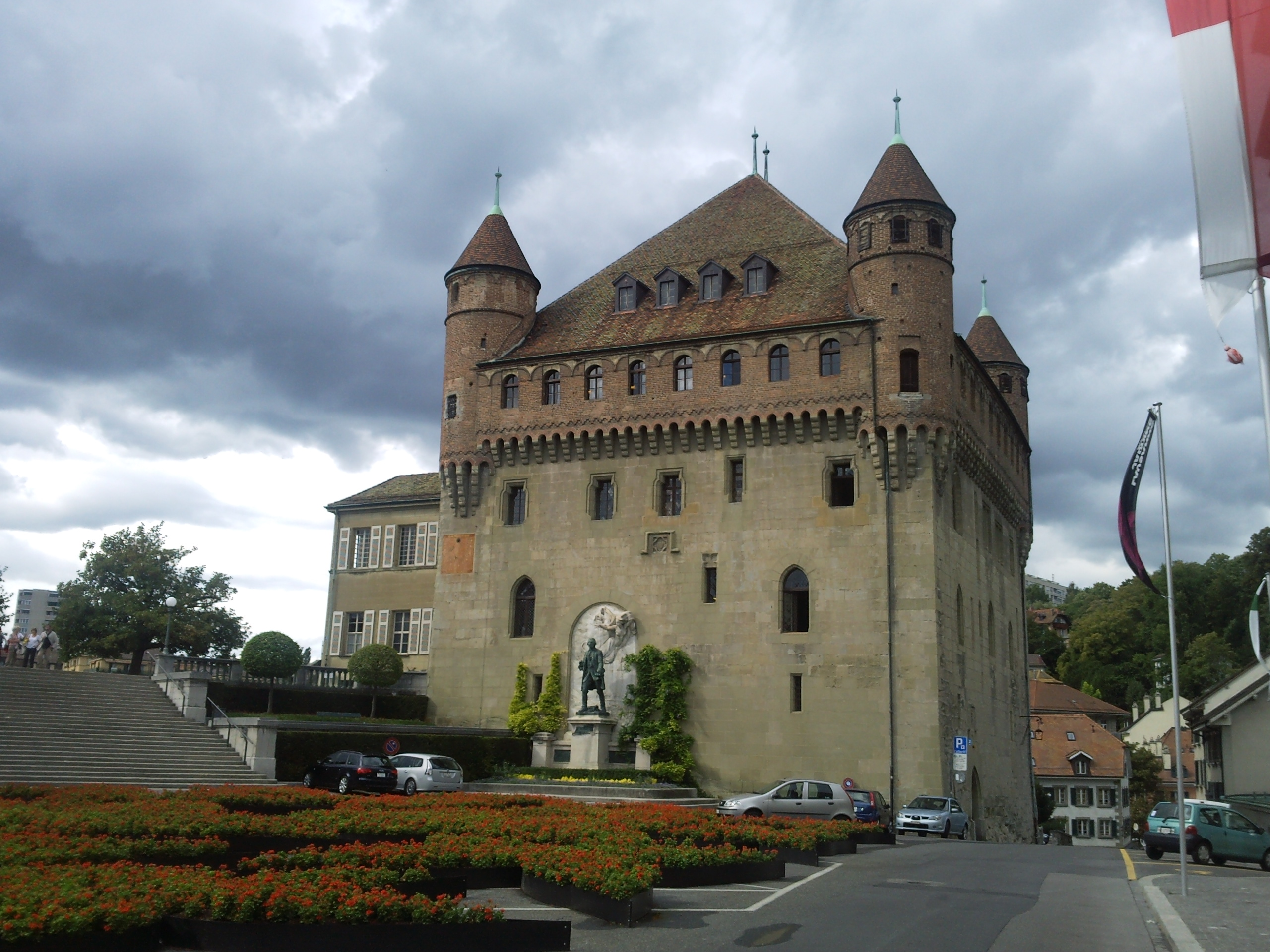 Le ch�teau St-Maire